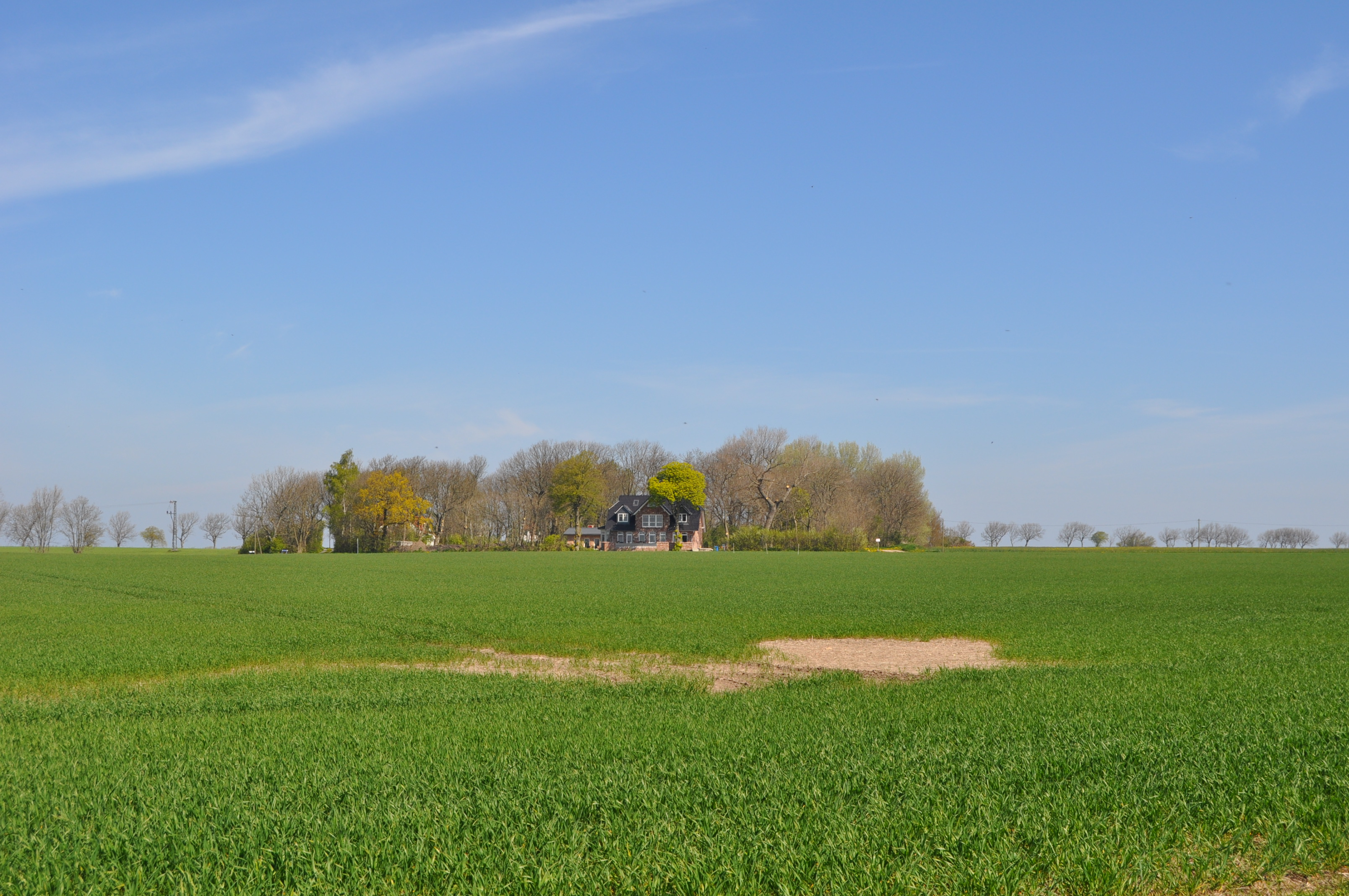 Das kleine Bauerndorf Nobbin mit 3 Gehöften